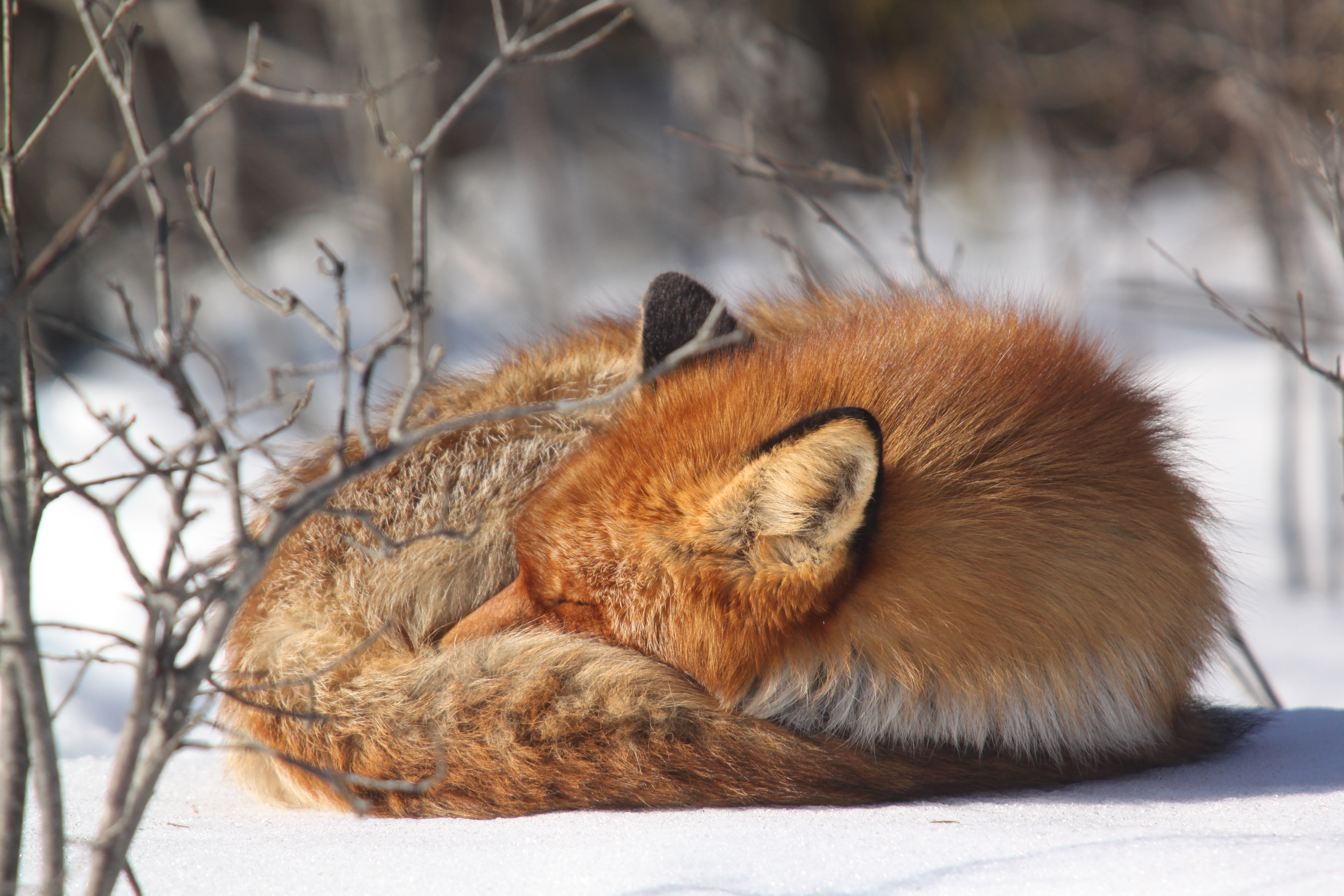 Magav punarebane.